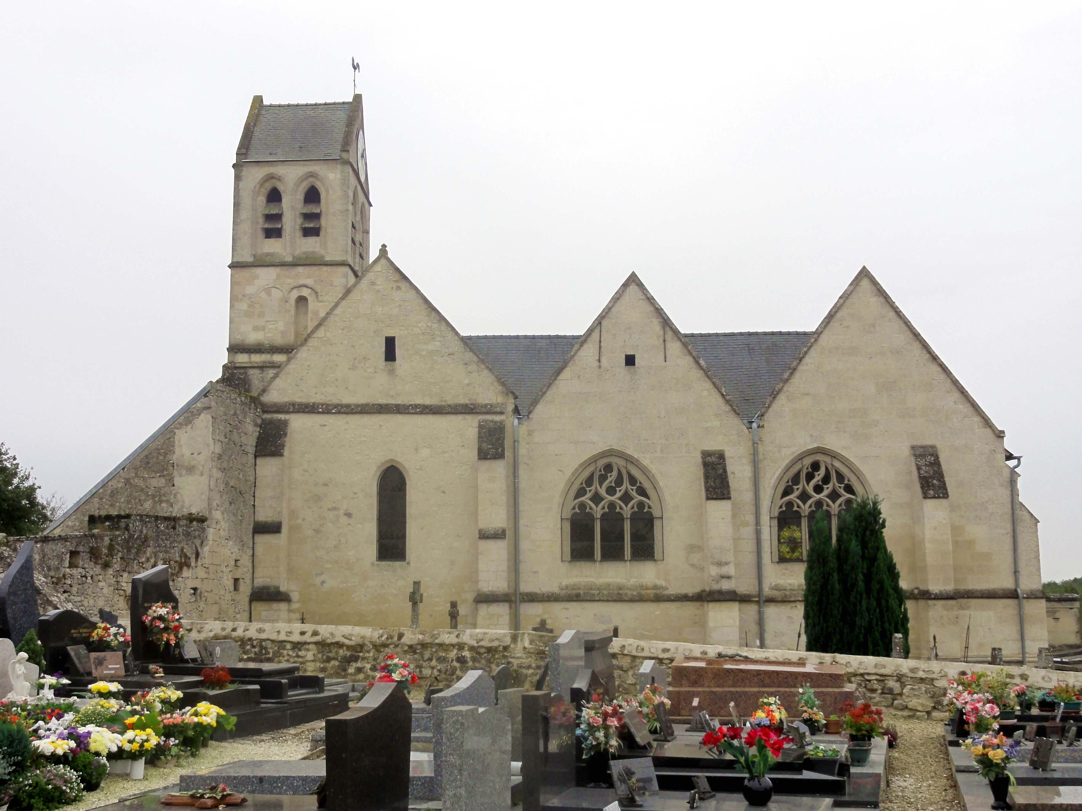 Vue depuis le nord.